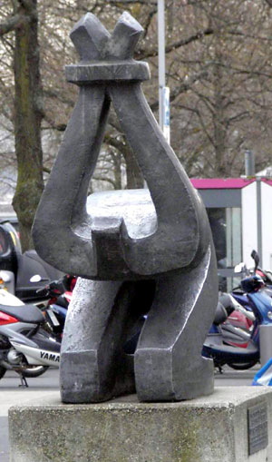 Skulptur "Den Opfern der Gewalt" von Vadim Sidur auf dem Friedrichsplatz in Kassel am Rande des Friedrichsplatzes. Eine Bürgerinitiative brachte 1974 Geld auf, damit der kleinformatige Entwurf realisiert werden konnte.